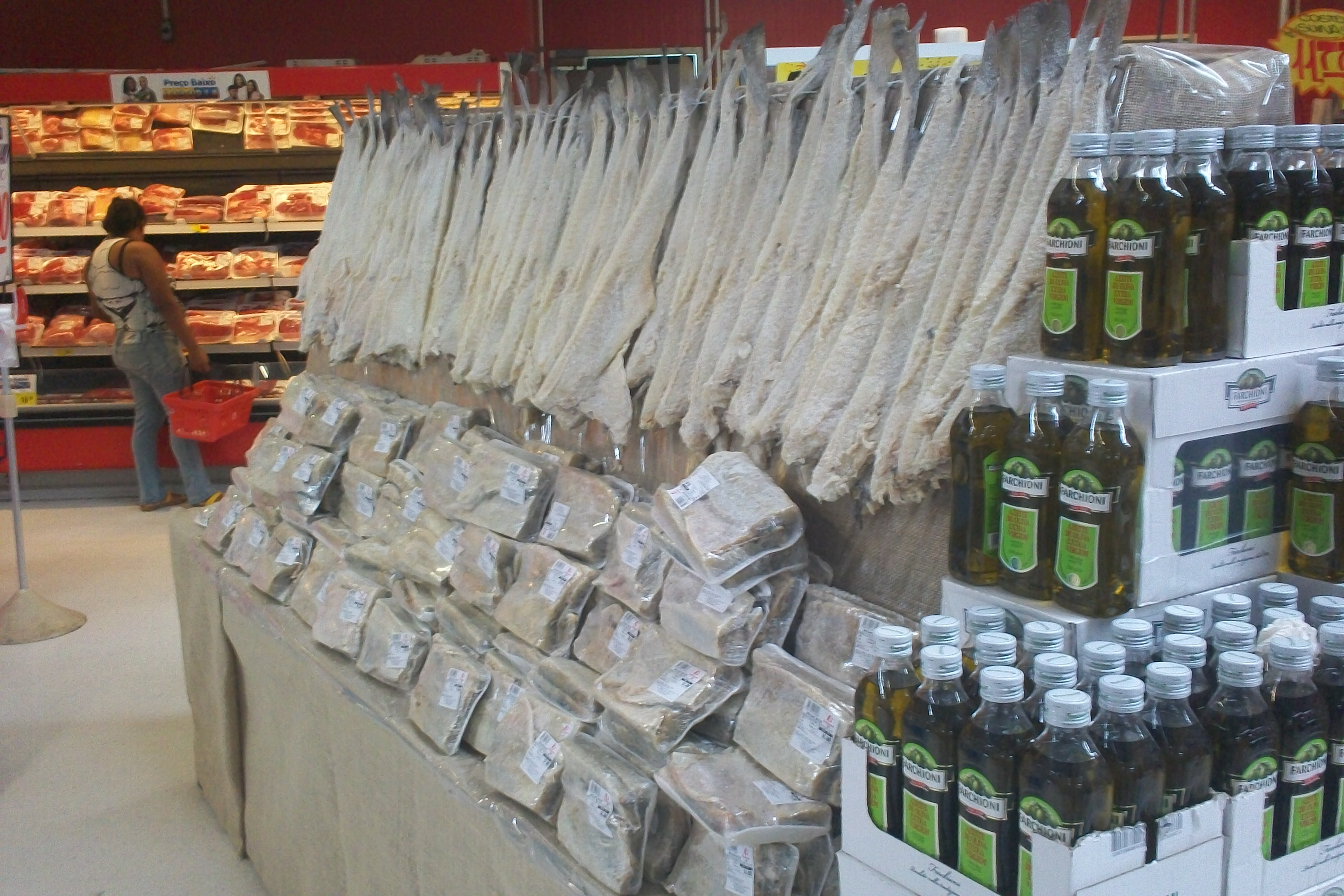 Góndola de bacalao seco en supermercado